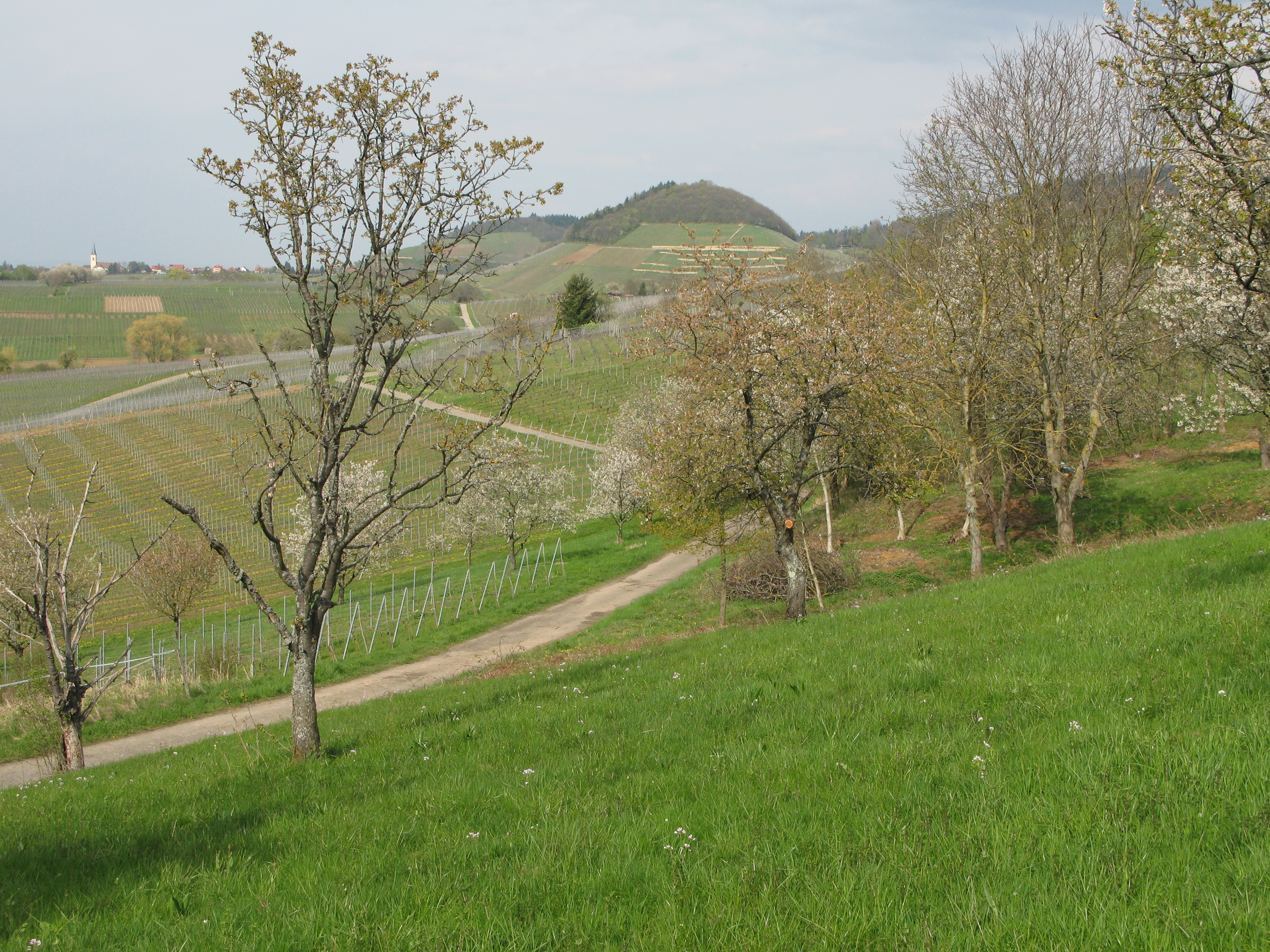 Landschaft am Fernwanderweg Markgräfler Wiiwegli im Markgräflerland mit dem Castellberg im Hintergrund.